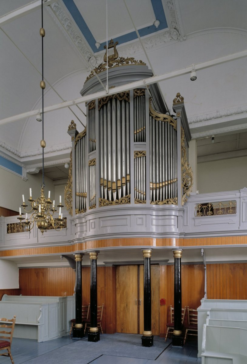 Nederlands Hervormde Kerk: Interieur, aanzicht orgel, orgelnummer 888 (opmerking: Gefotografeerd voor Het Historische Orgel in Nederland 1858-1865)